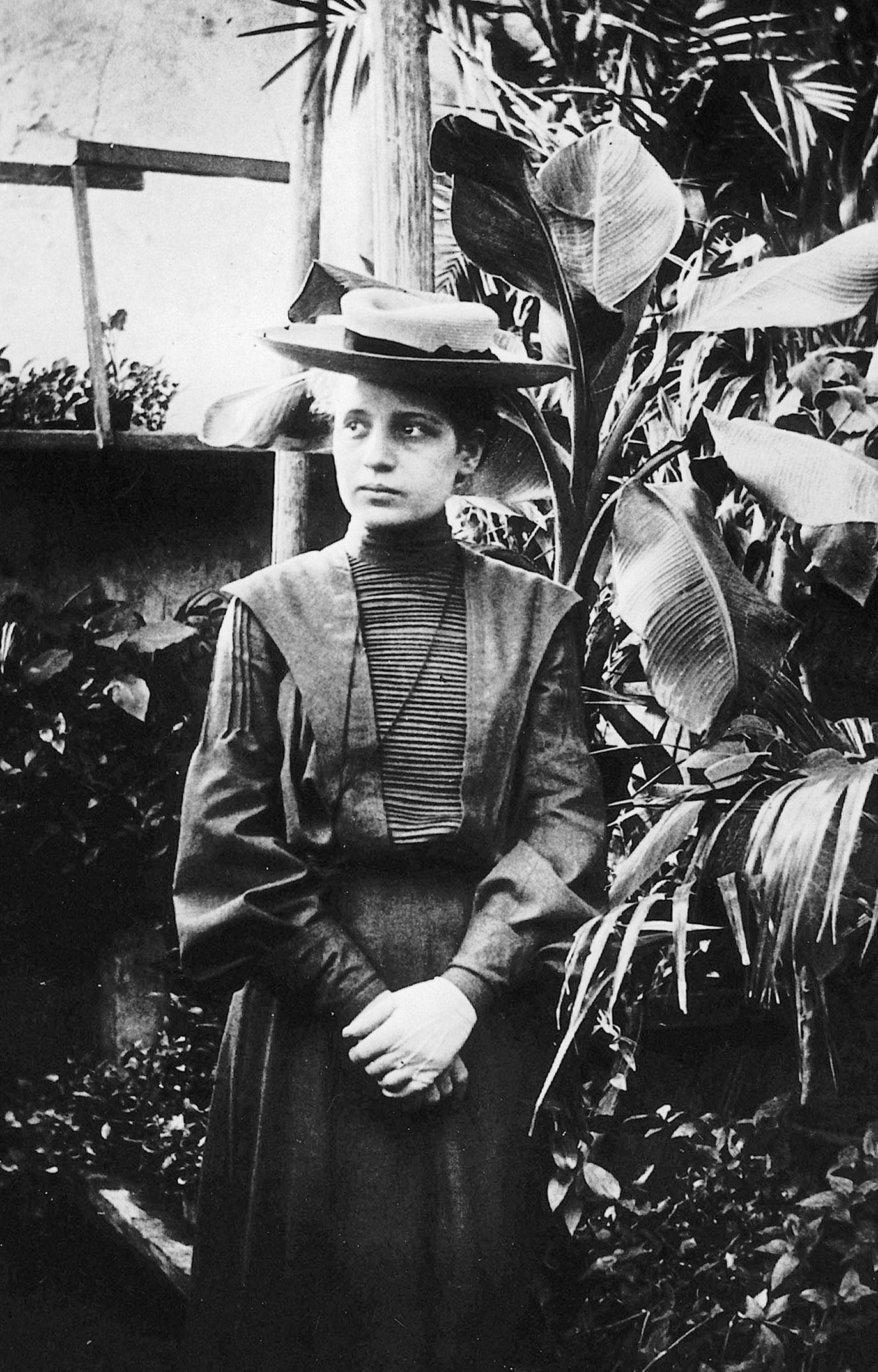 Lise Meitner around 1906 in Vienna